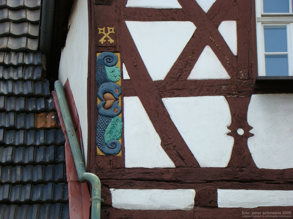 Historisches Gebäude Altstadtstraße 22 in Eppingen, Detail